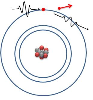 comptonspredning ved gammastråling